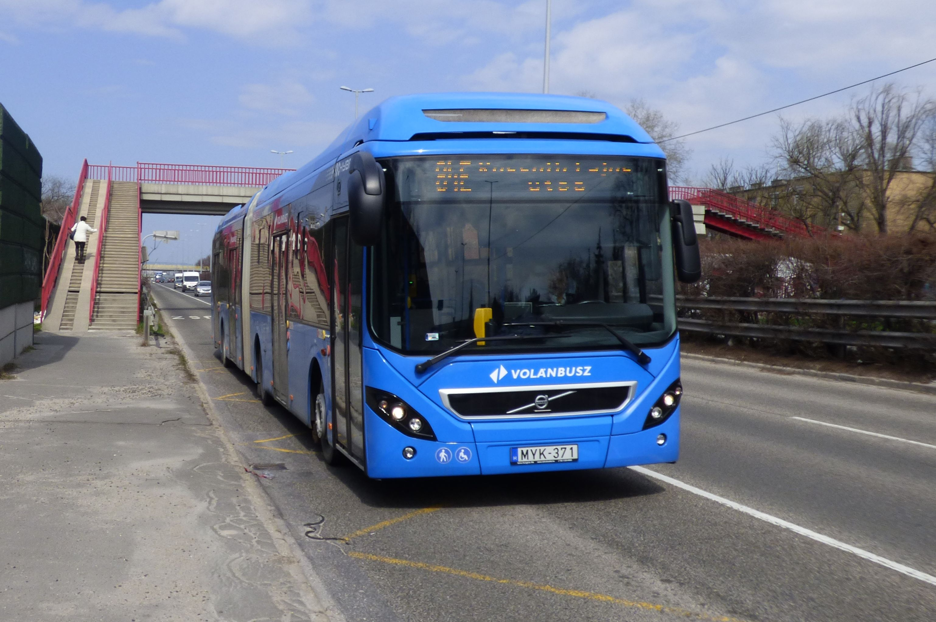 84E jelzésű Volvo 7900A Hybrid busz a Nagykőrösi úton (frsz. MYK-371)